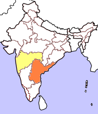 Kartorna bygger på resultat i senaste delstatsval (Juni 2004). Rött betyder att partiet deltar i delstatsregeringen, orange att partiet vann mandat i senaste delstatsvalet och gult att partiet hade lanserat kandidater men utan att vinna mandat. Kartorna tar inte hänsyn till avhopp, partifusioner och fyllnadsval under den ordinarie mandatperiodens gång.